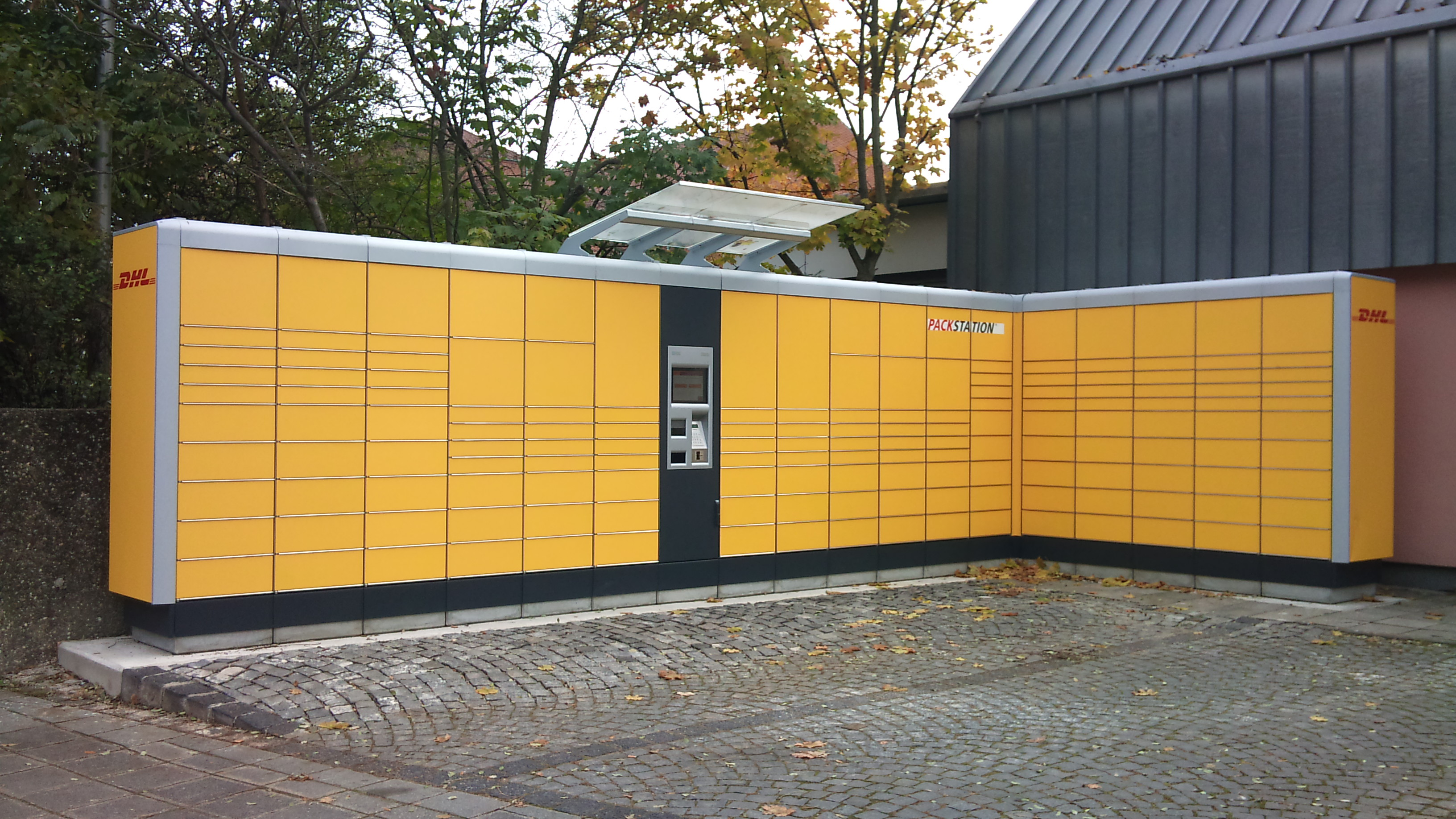 DHL Packstation der etwas groesseren Art in Nuernberg.